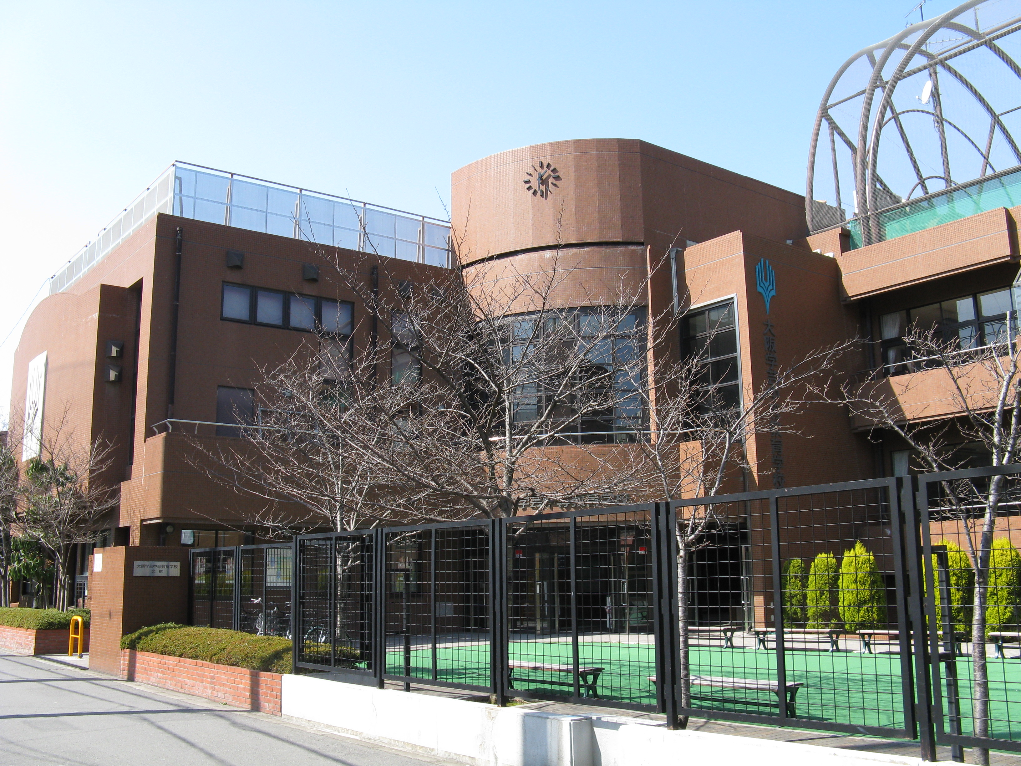 大阪学芸中等教育学校